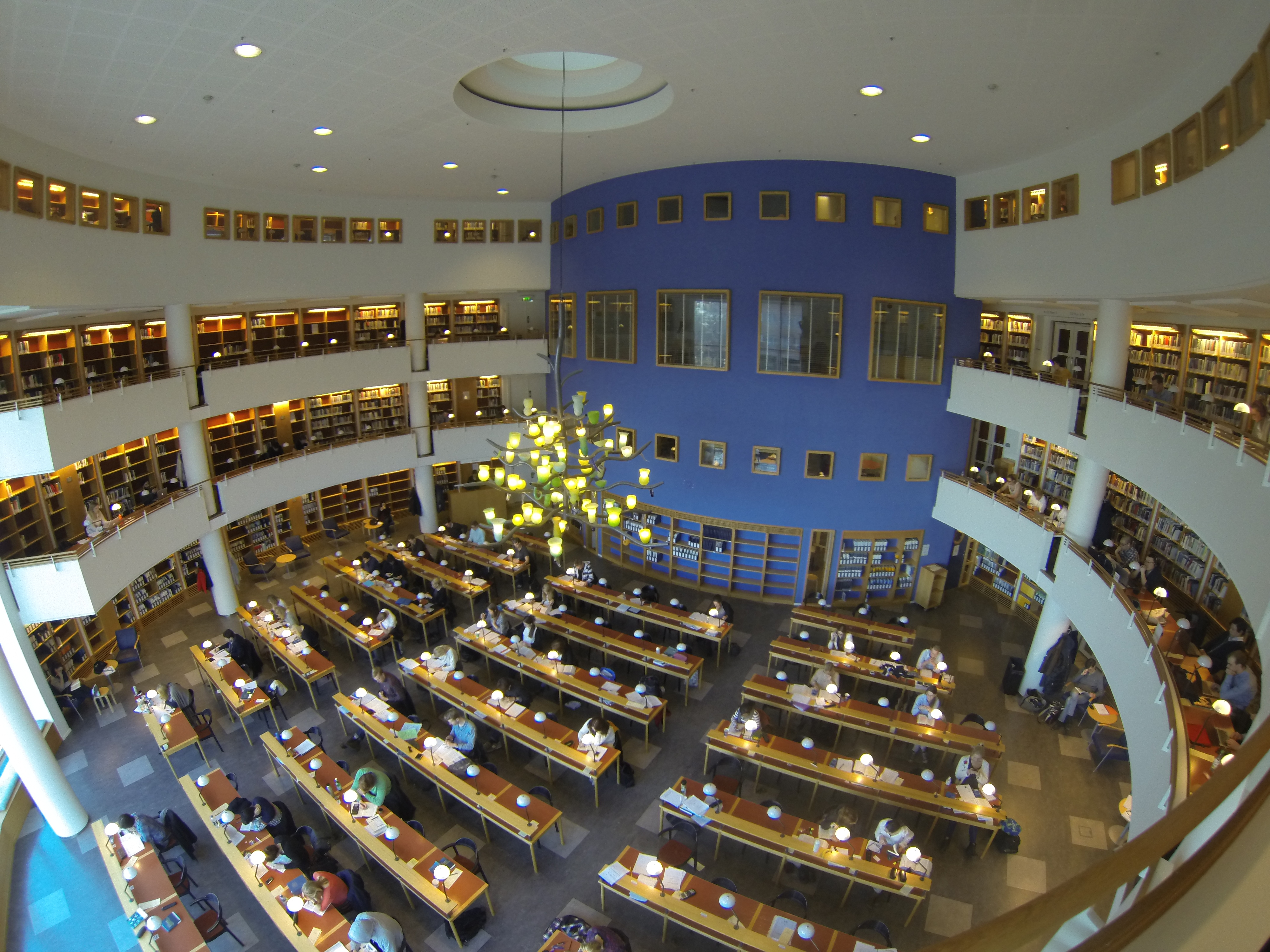 Läsesalen på Handelshögskolan i Göteborg.